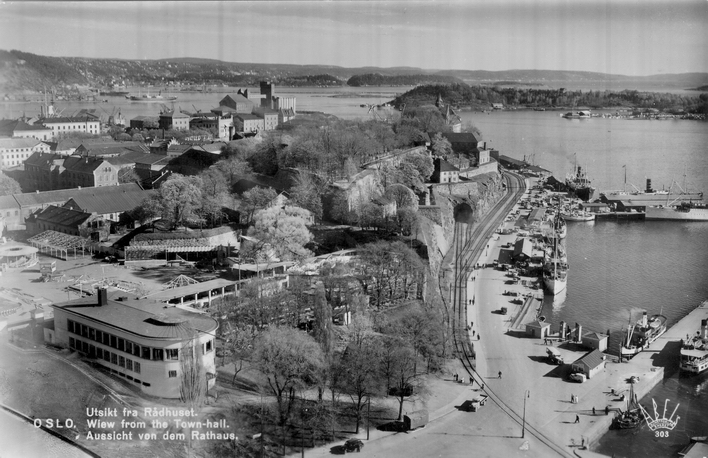 Akershus med havnebanen sett fra Oslo rådhus